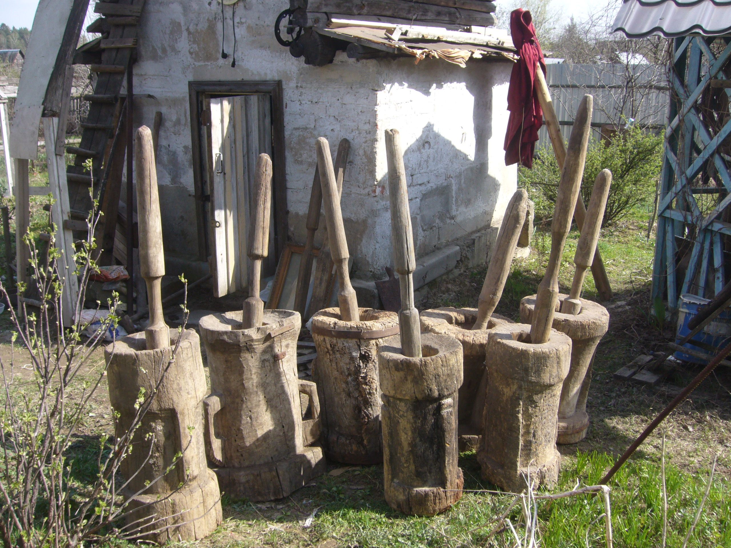 Ступы и песты деревянные. Мордовия (Россия).